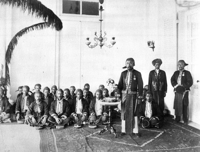 Foto. Bupati Garut R. Adipati Aria Wiratanudatar bersama para bawahannya (ambtenaar).